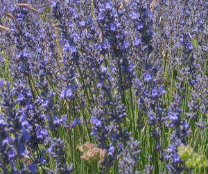 Lavendel in der Provence